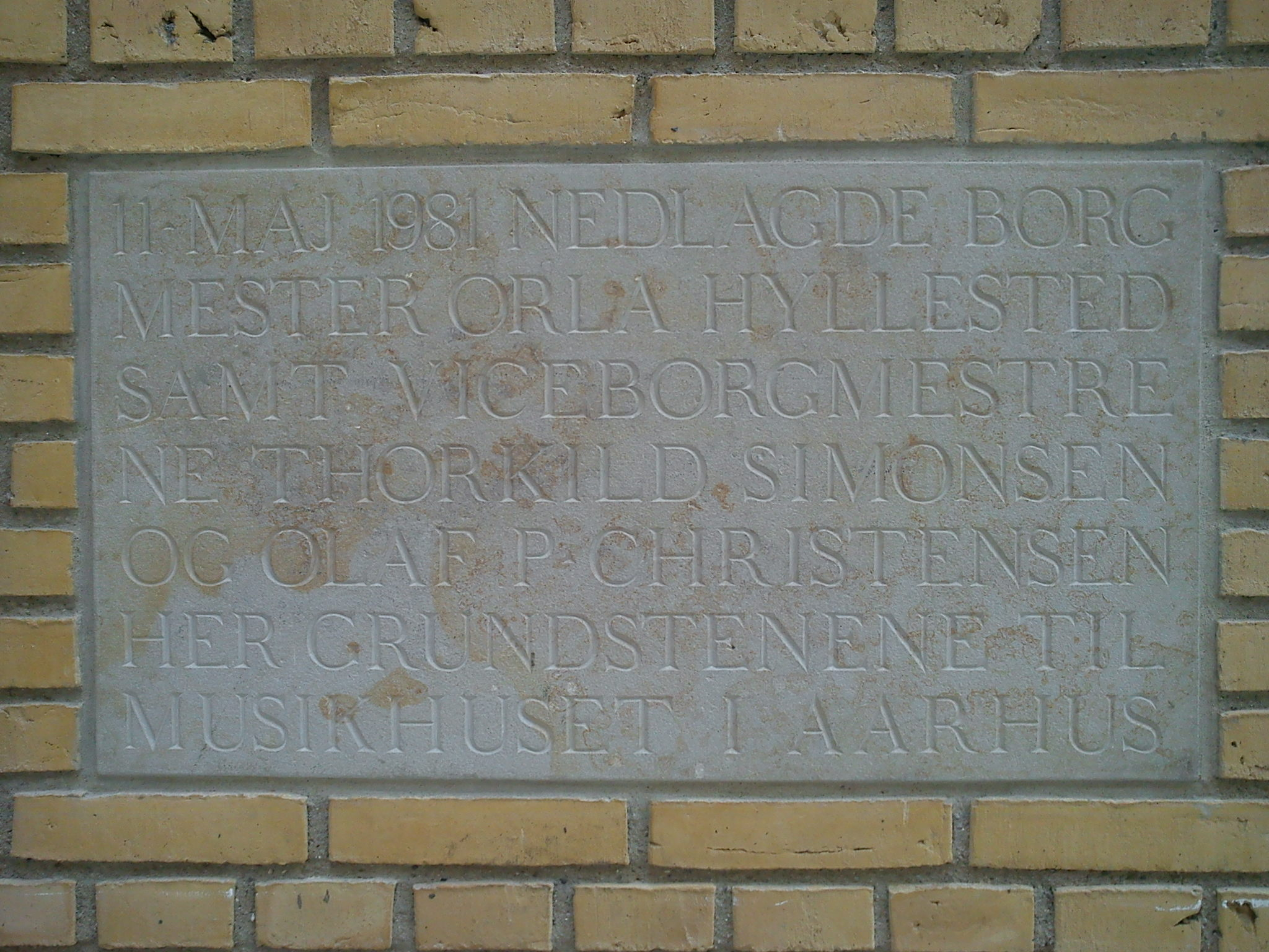 Grundstenen i Musikhuset i Aarhus.